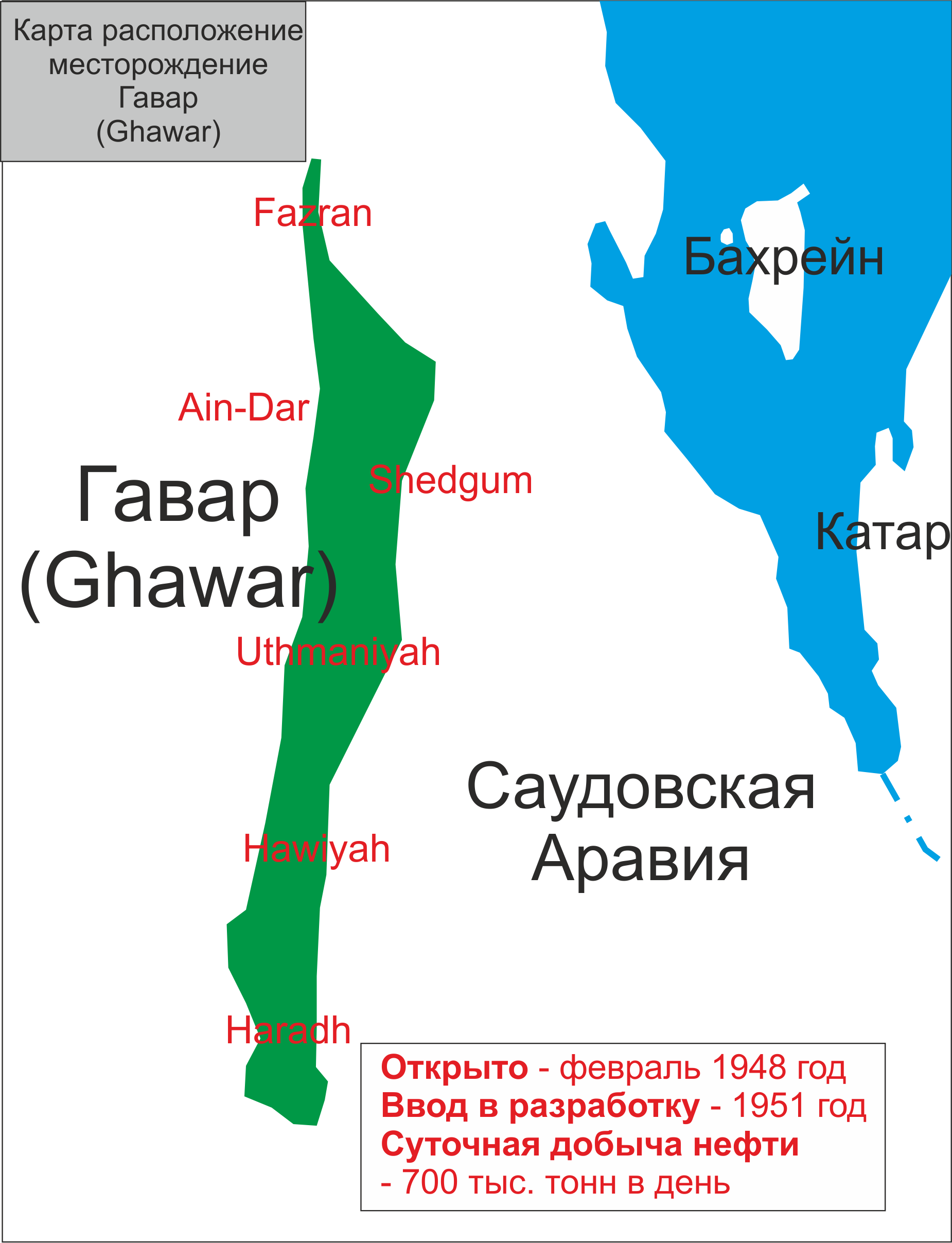 Самая крупная нефтяная месторождение в мире